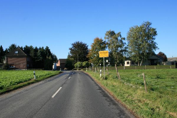 Ortslage in Wegberg-Kehrbusch